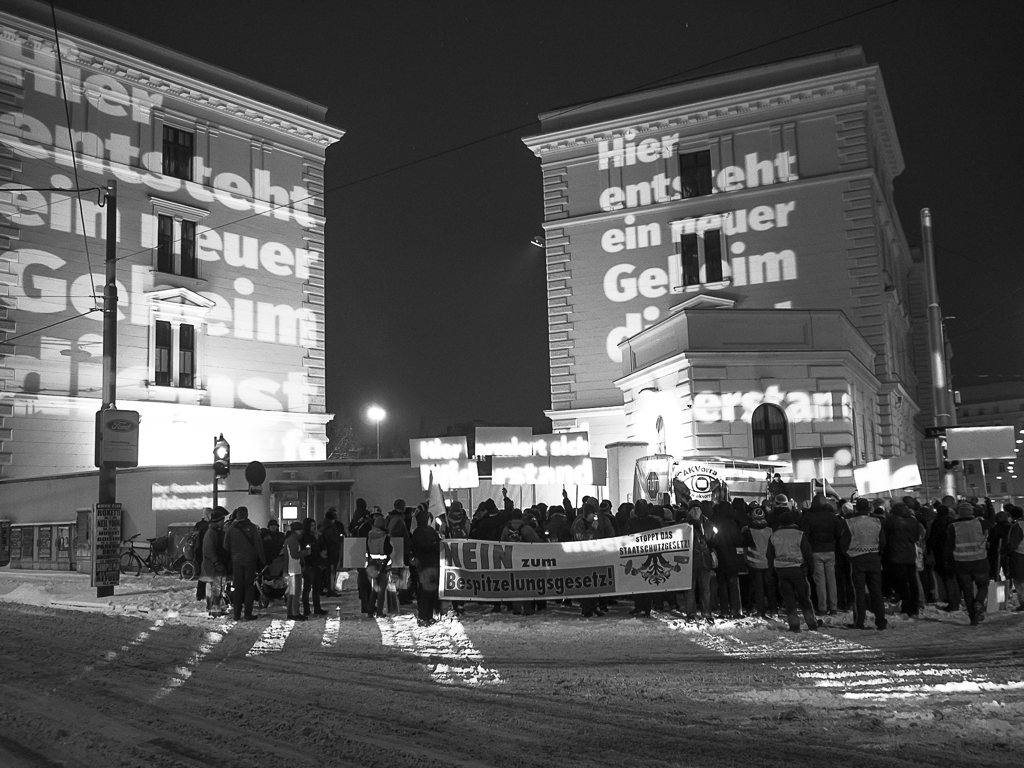 "Hier entsteht ein neuer Geheimdienst" Lichtermeer gegen Überwachung, 23. Jänner 2016: Kundgebung gegen das geplante Staatsschutzgesetz vor dem Bundesamt für Verfassungsschutz und Terrorismusbekämpfung Photocredit: Karola Riegler